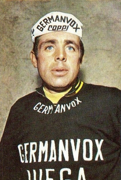 Figurina CAMPIONI dello SPORT 1970/71-n.164- REYBROUCK - CICLISMO